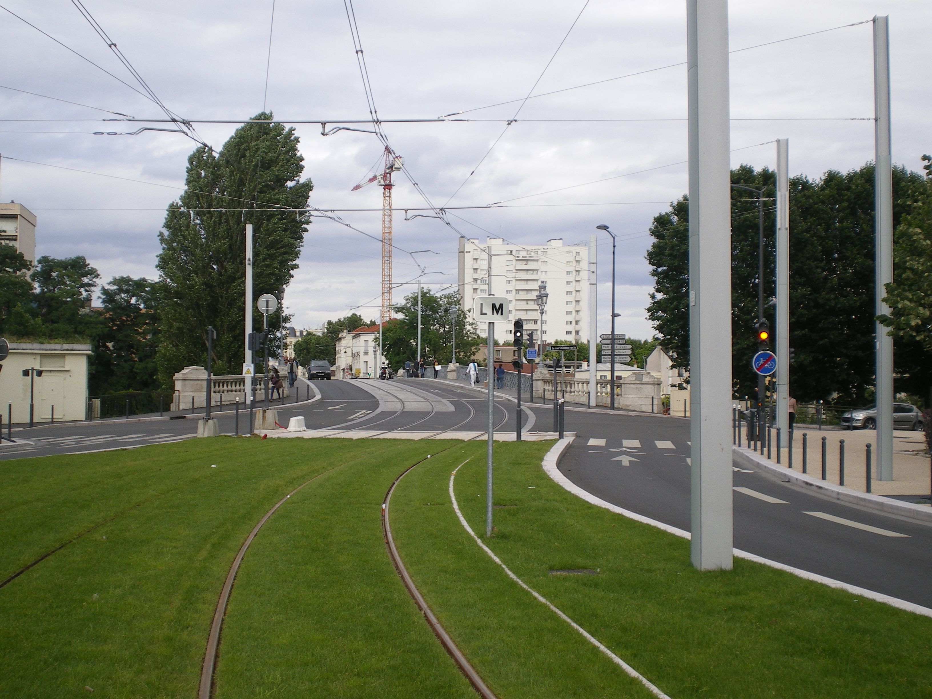 Extension de la ligne T1 à l'Ouest pendant la phase d'essais - Pont sur le grand bras de la Seine et à l'arrière plan l'Île-Saint-Denis